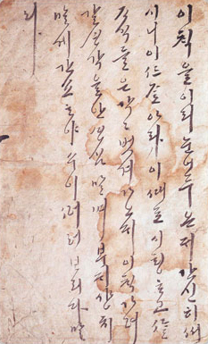 Eumsik dimibang (음식디미방), a cookbook made in 1670 by Jang Gyehyang(장계향), or Lady Jeong of Andong, Gyeongsangbuk-do located in Korea.